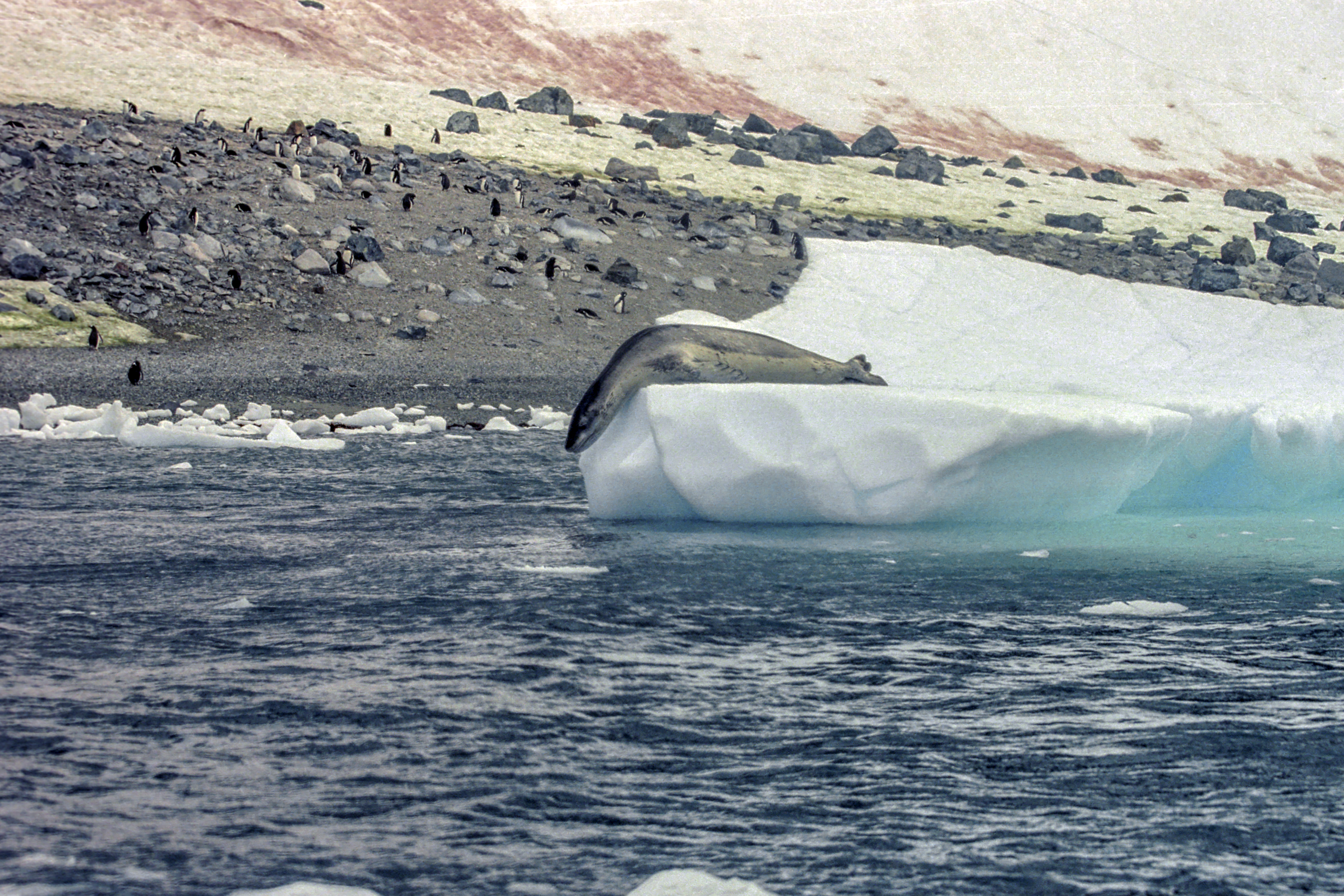 Antarctic